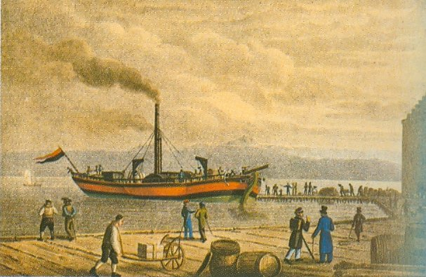 Dampfschiff Wilhelm in Friedrichshafen Eberhard Emminger (1808-1885) um 1825 Ludwigsburg, Heimatmuseum, Inv.Nr. 212 S. 1072